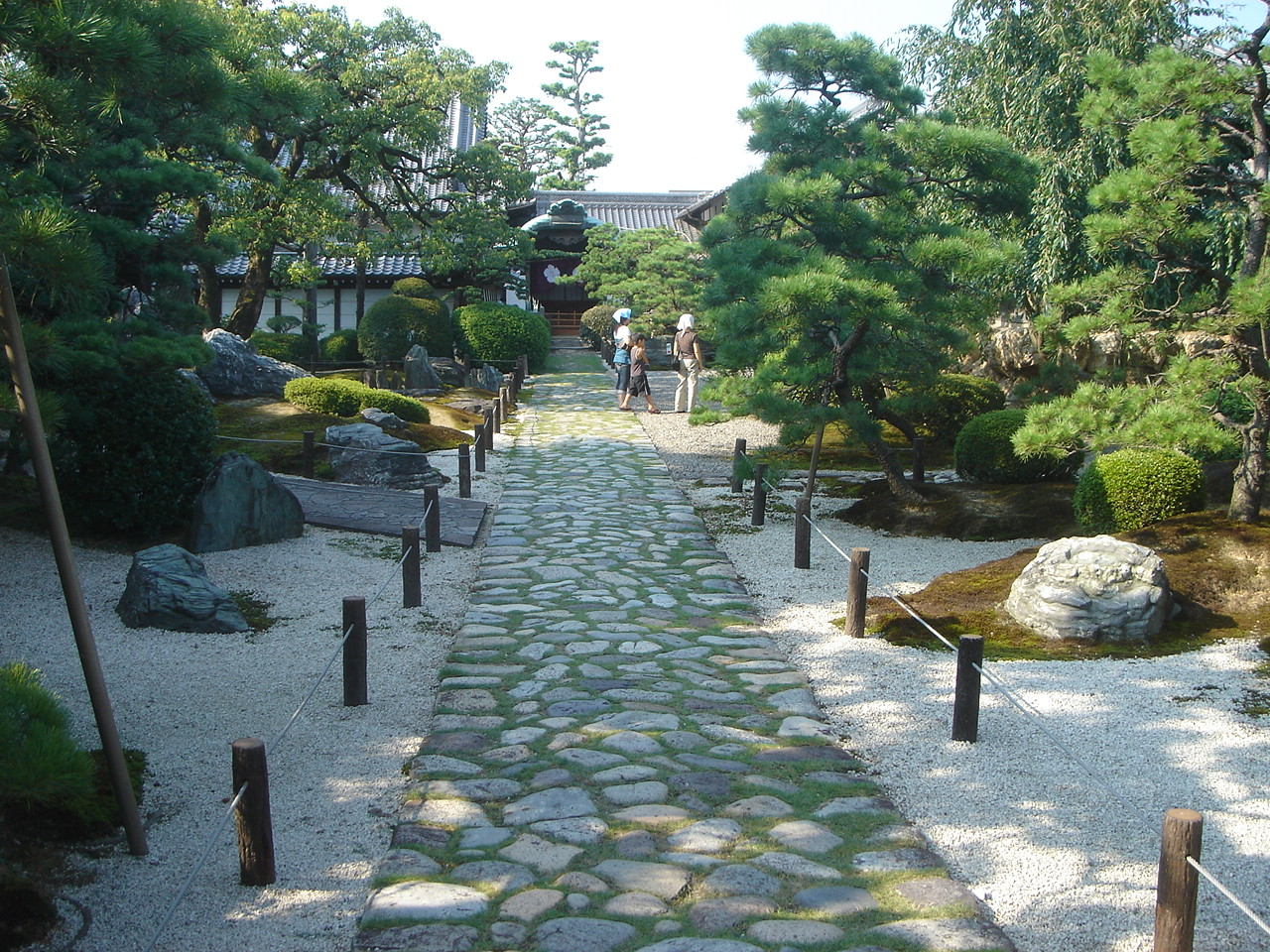 Sōfuku-ji(Temple) in Gifu Pref(崇福寺 (岐阜市)),Gifu,Gifu,Japan(岐阜県岐阜市)で撮影